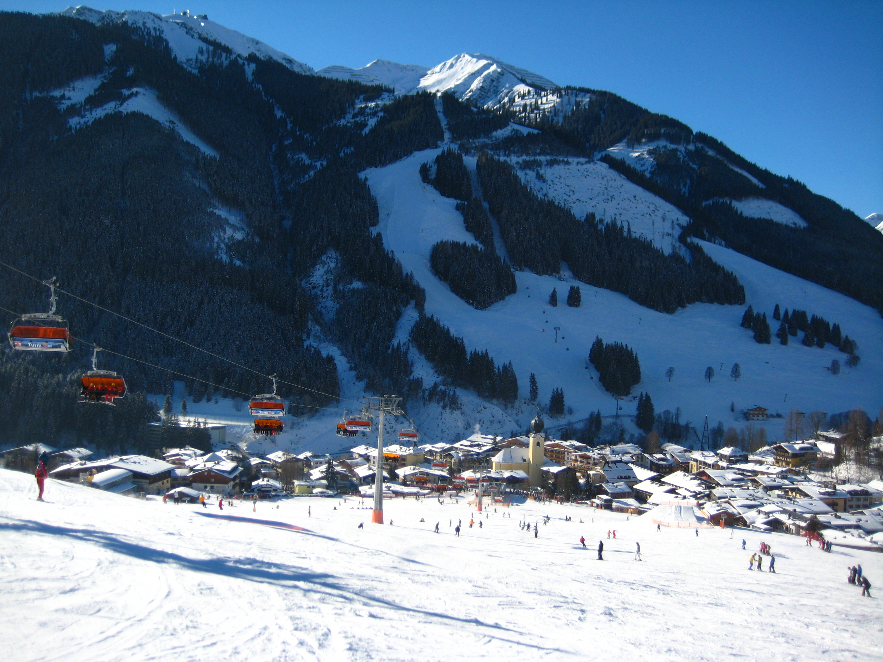 Der Ortskern von Saalbach am Fuße des Schattbergs.